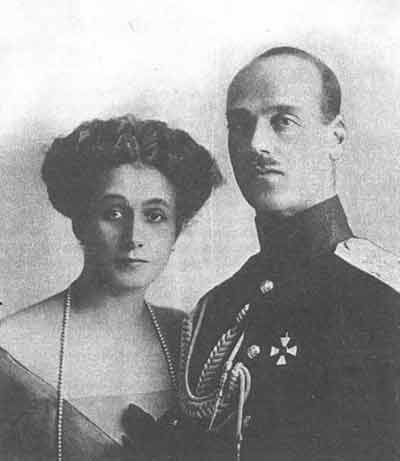 Grão-Duque Miguel Alexandrovich com a esposa Natalia